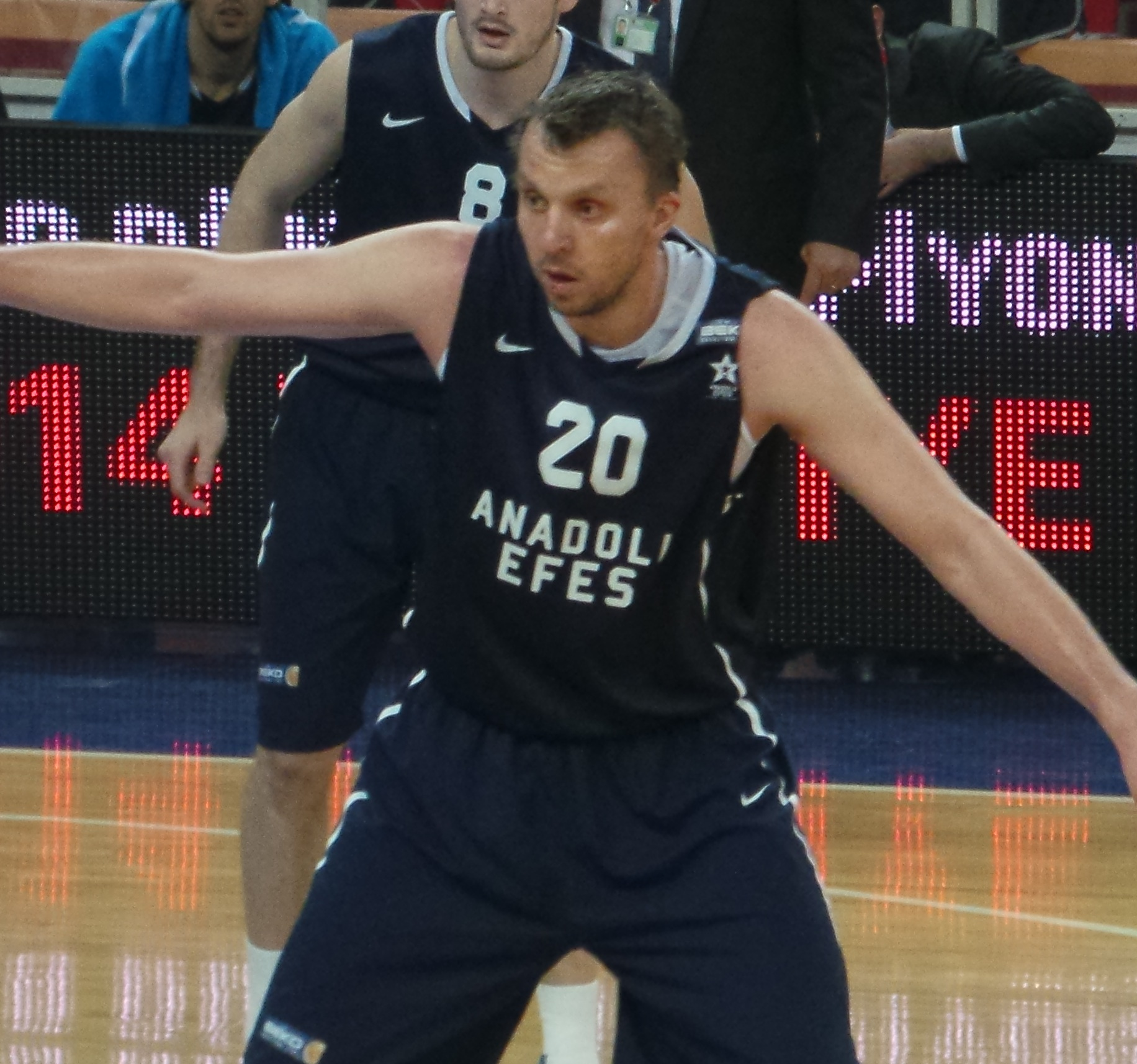 Duško Savanović